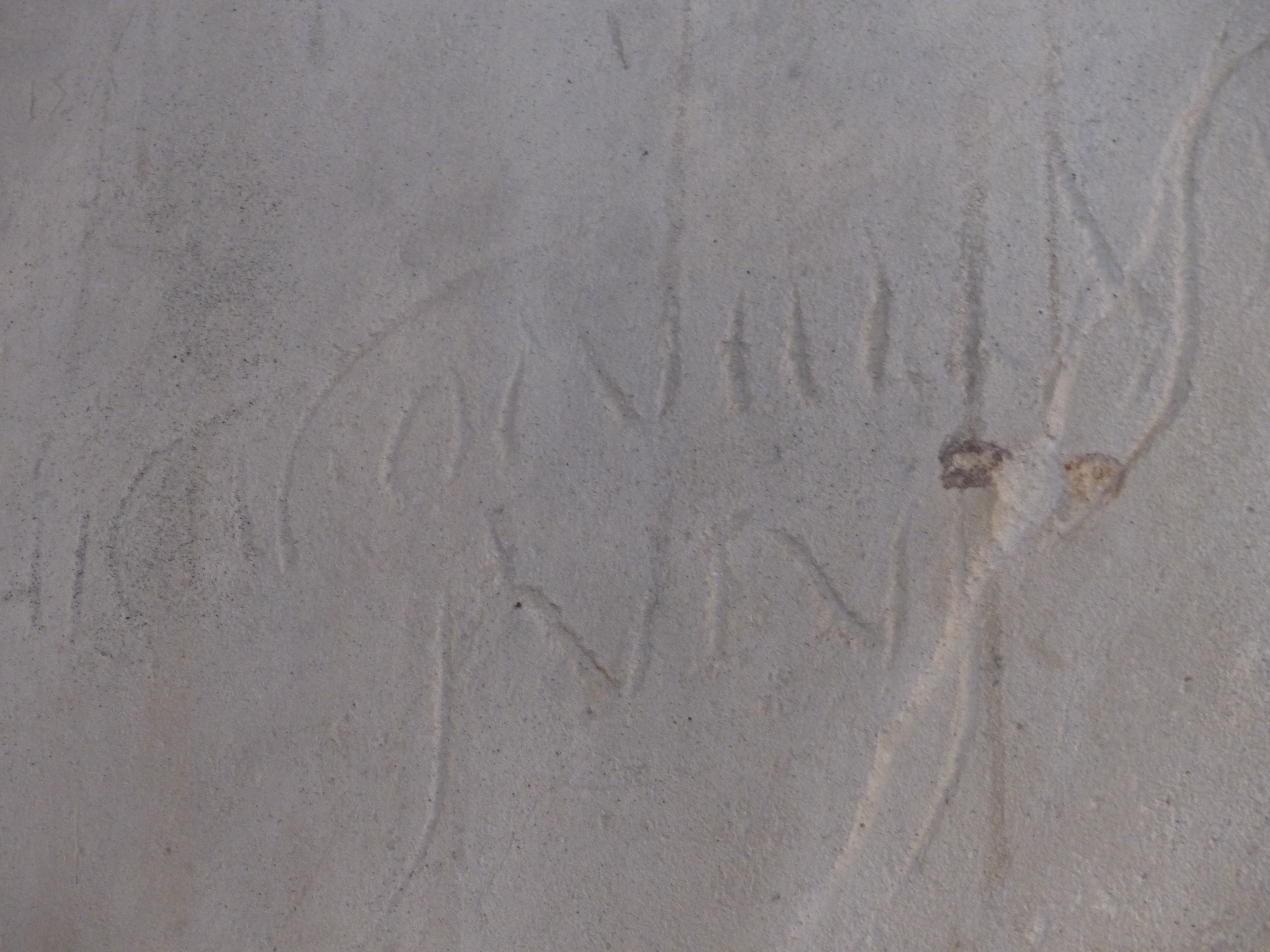 Lupanar de Pompeya